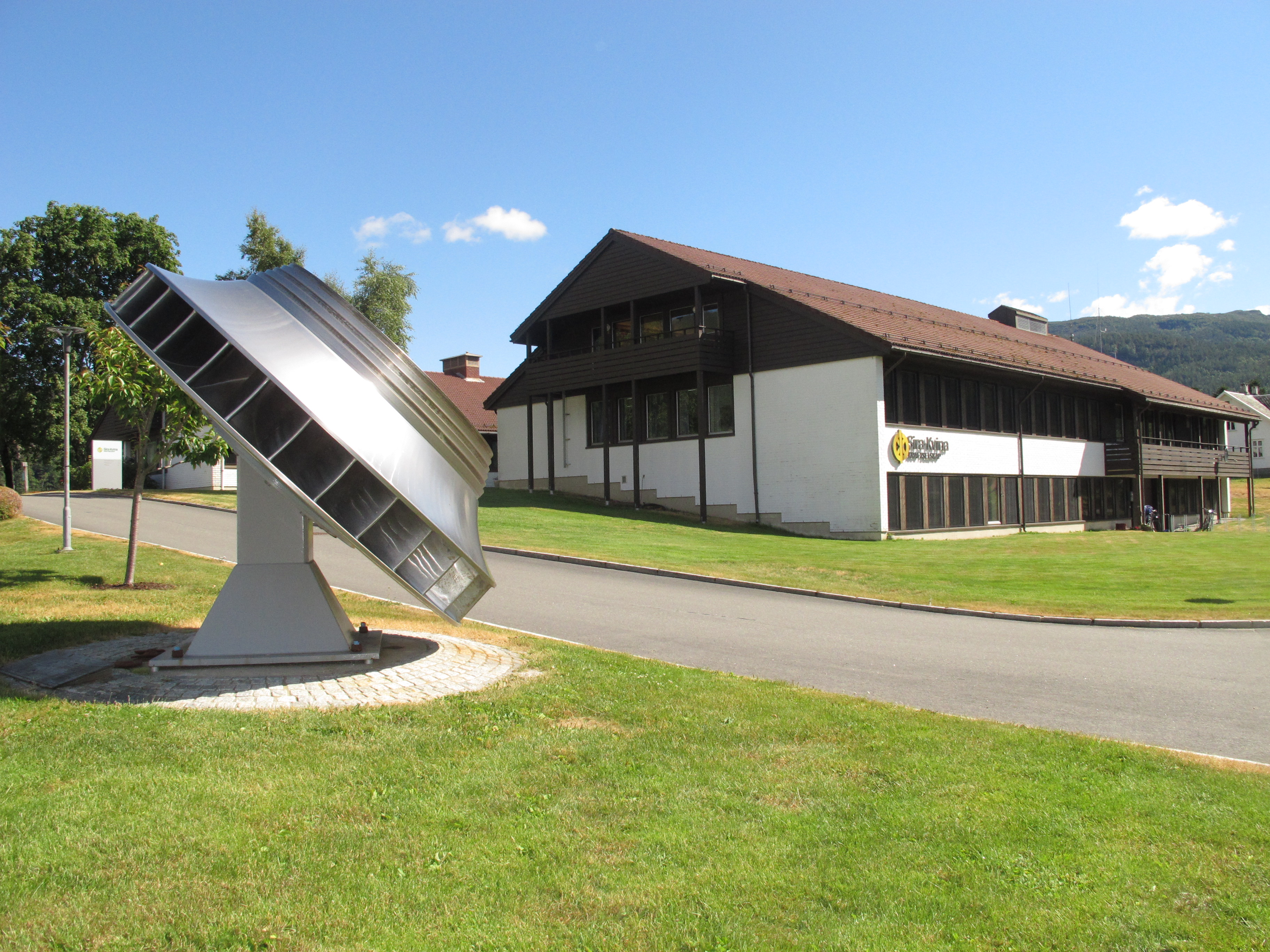 Bilde av Sira-Kvina kraftselskaps hovedkontor på Tonstad